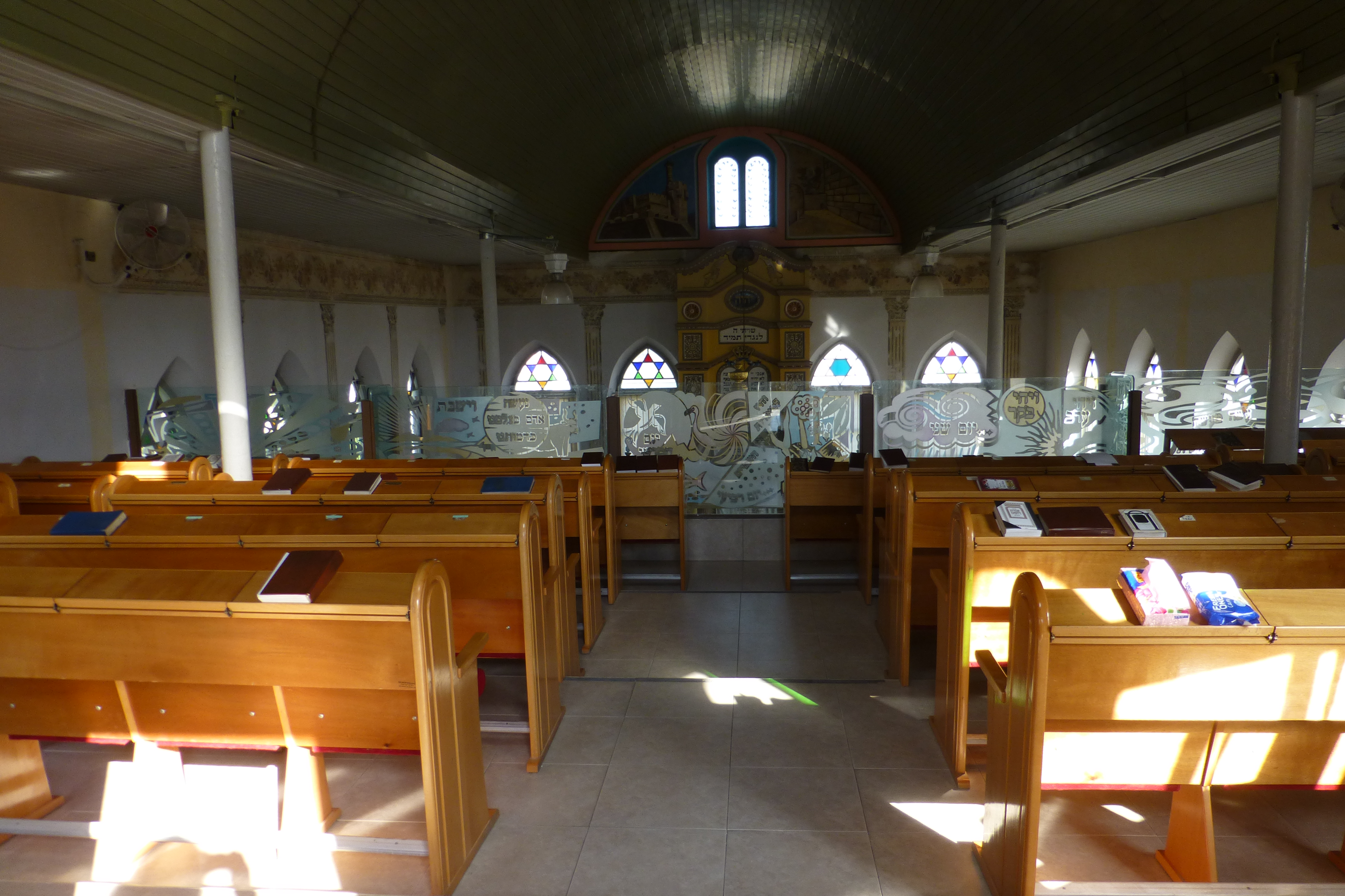 נוסד על ידי ראובן לרר ושימש בעבר כבית ספר, בית כנסת, בית ההגנה והיה המרכז הקהילתי הראשון למושבה נס ציונה. כיום משמש כמוזיאון בית ראשונים.